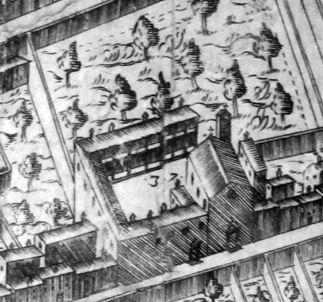 Pianta del buonsignori, dettaglio 037 crocetta monastero